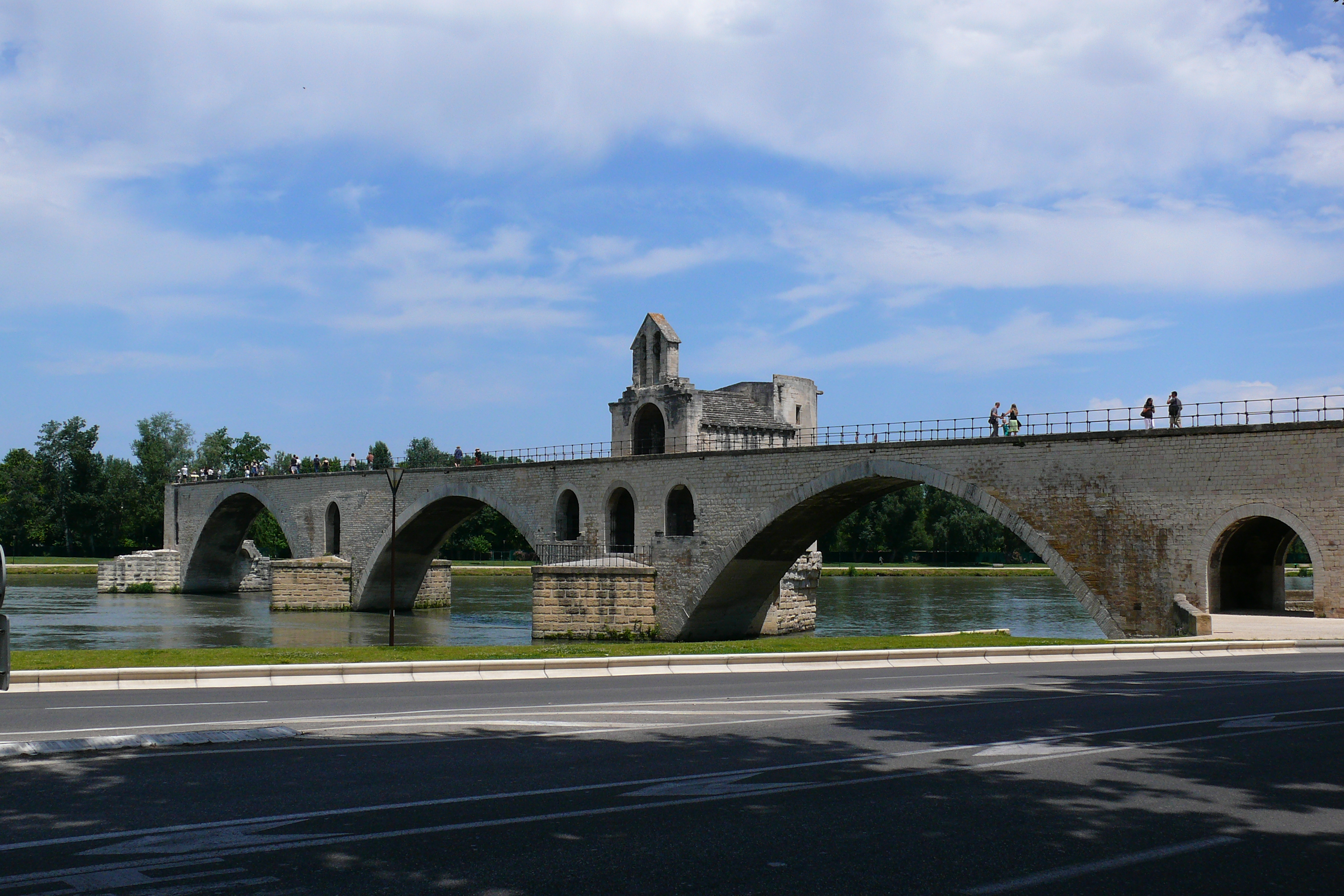 Die Pont St.Benezet in Avignon